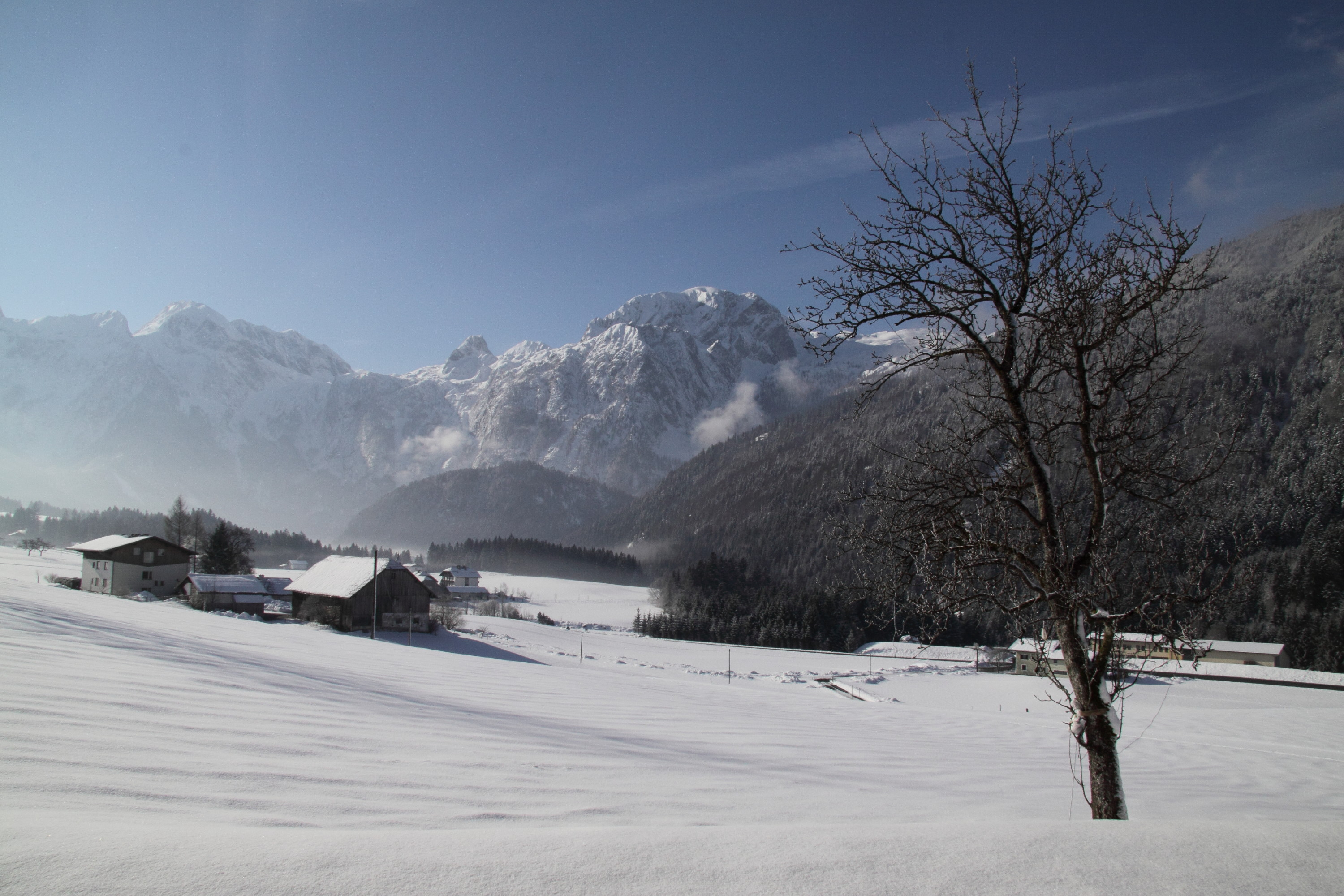 Tennengebirge This media shows the nature reserve in Salzburg with the ID NSG00005.